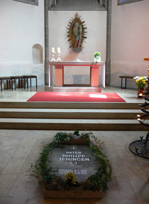 Stiftsbasilika St. Vitus, Ellwangen (Jagst) LIebfrauenkapelle mit Grab des Philipp Jeningen